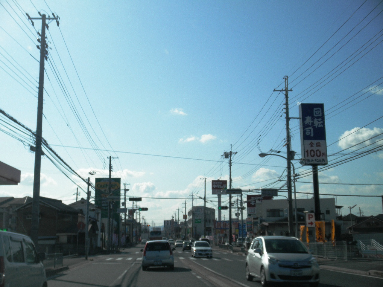 兵庫県神戸市西区玉津町出合 国道175号